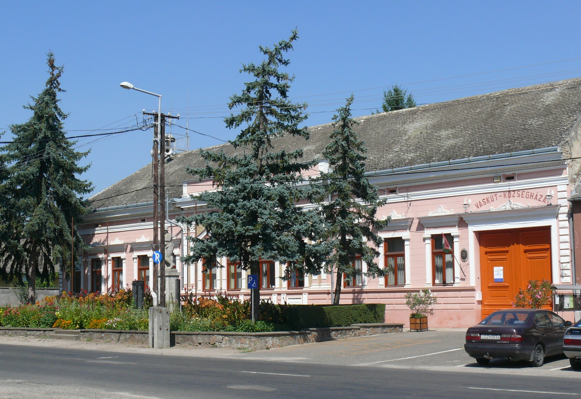 A vaskúti Polgármesteri Hivatal, előtte a I. vh-s szoborral és II. vh-s márványtáblákkal